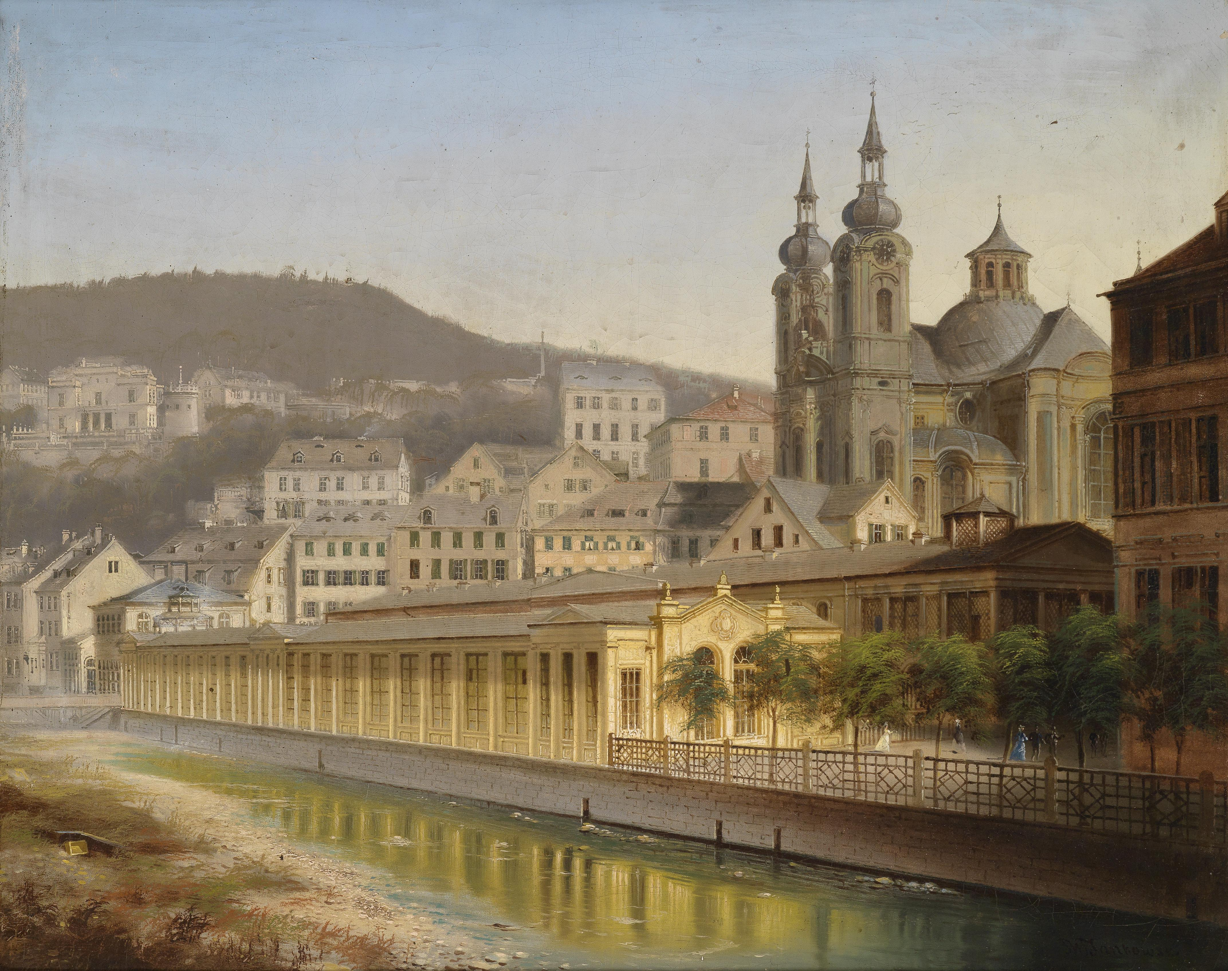 Blick auf Karlsbad, signiert J. W. Jankowski, Öl auf Leinwand, 62 x 78 cm